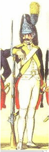 Uniform des Kap-Regiments 1787 – 1808